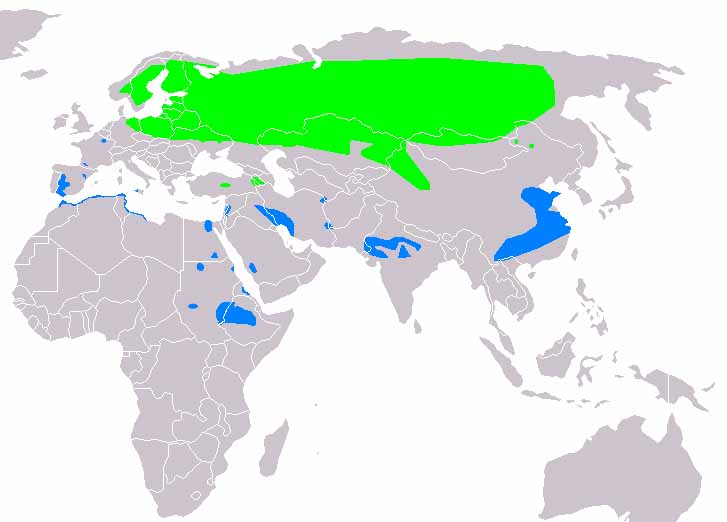 Ареал распространения серого журавля (Grus grus)